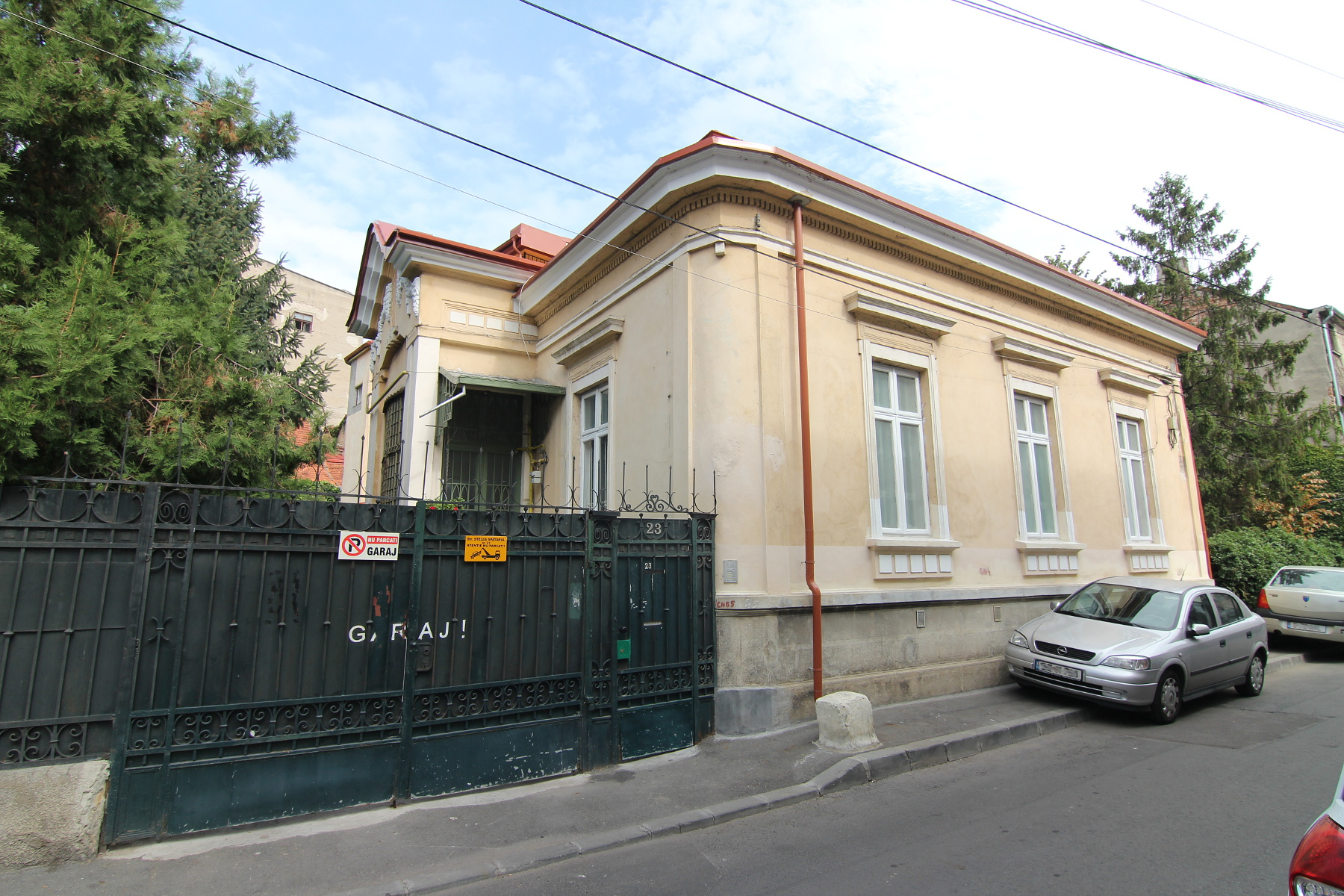 Casă pe Stelea Spătarul